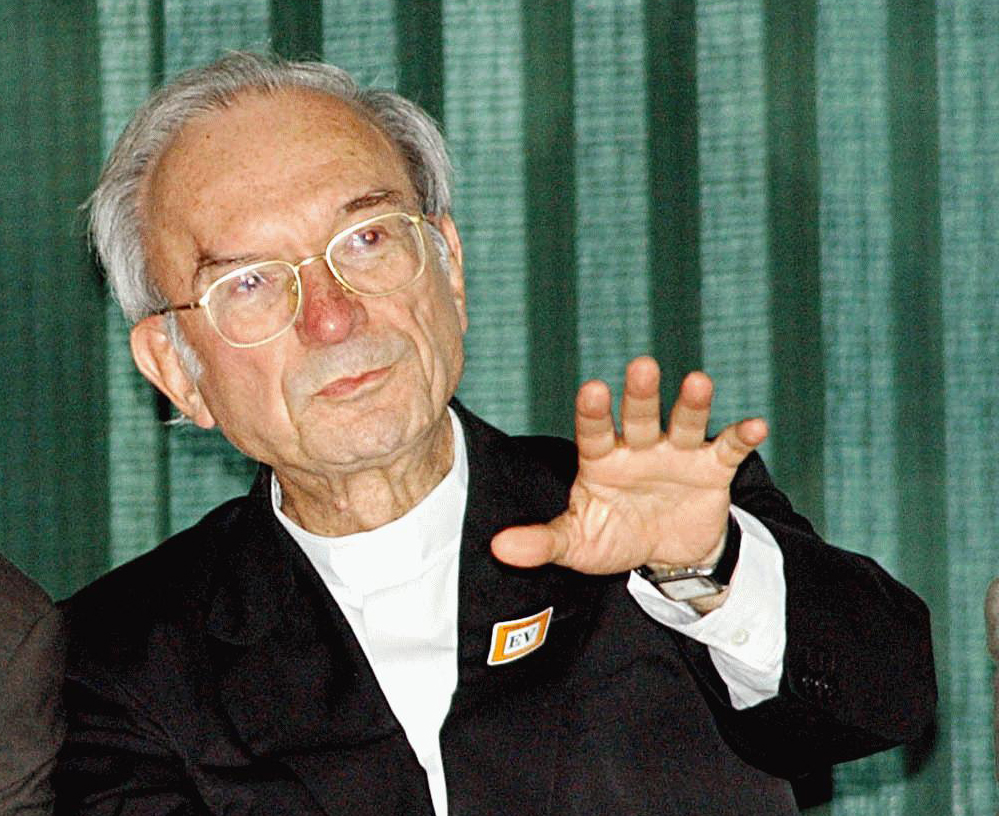 O arcebispo de Mariana Luciano Mendes de Almeida.